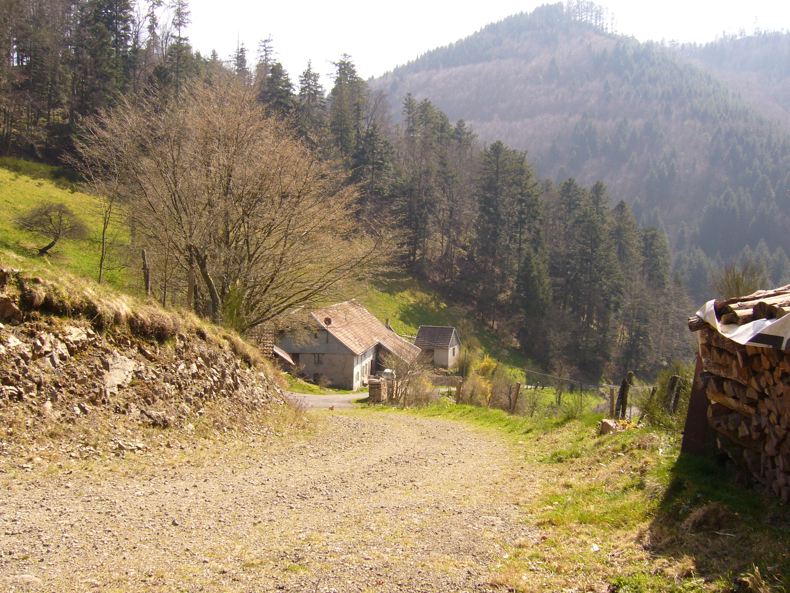 Bestegoutte 041.JPG